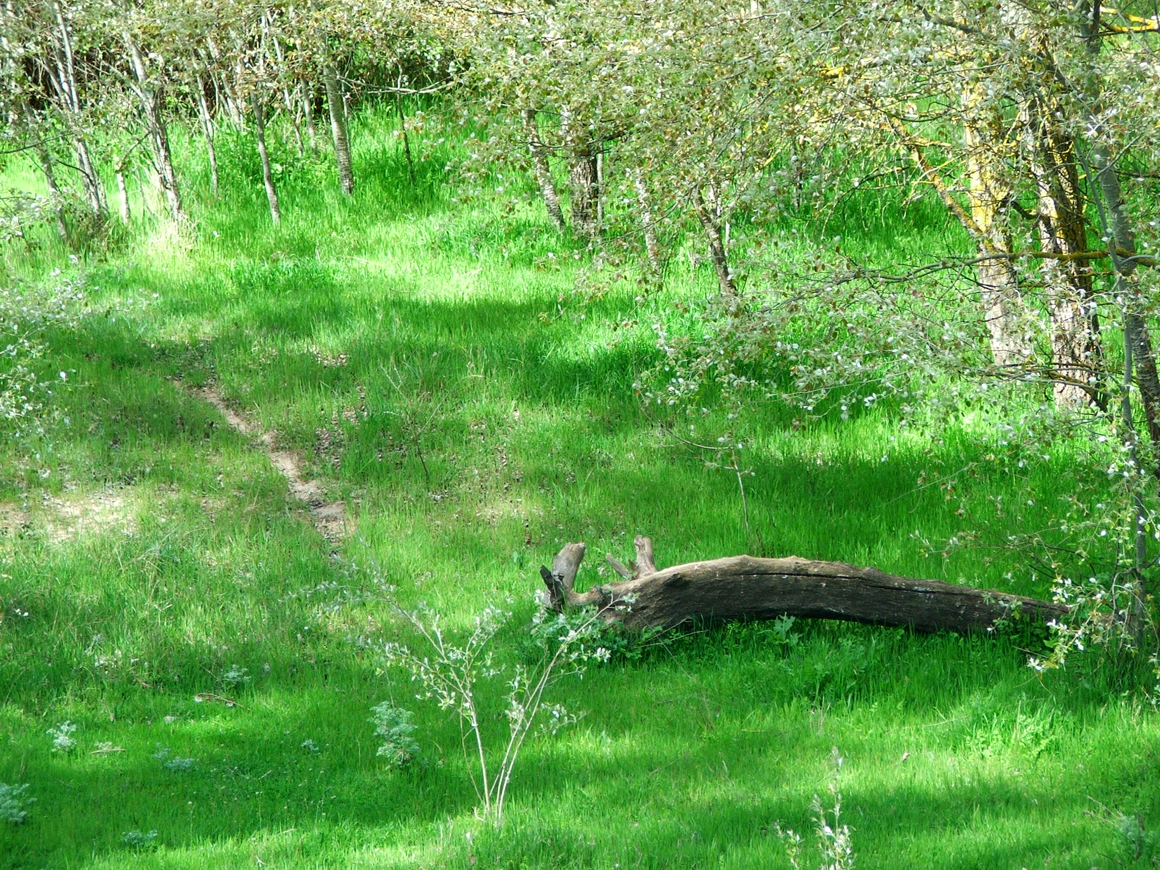 Un pequeño rincón frente a la Pesquera de Tudela de Duero (España)